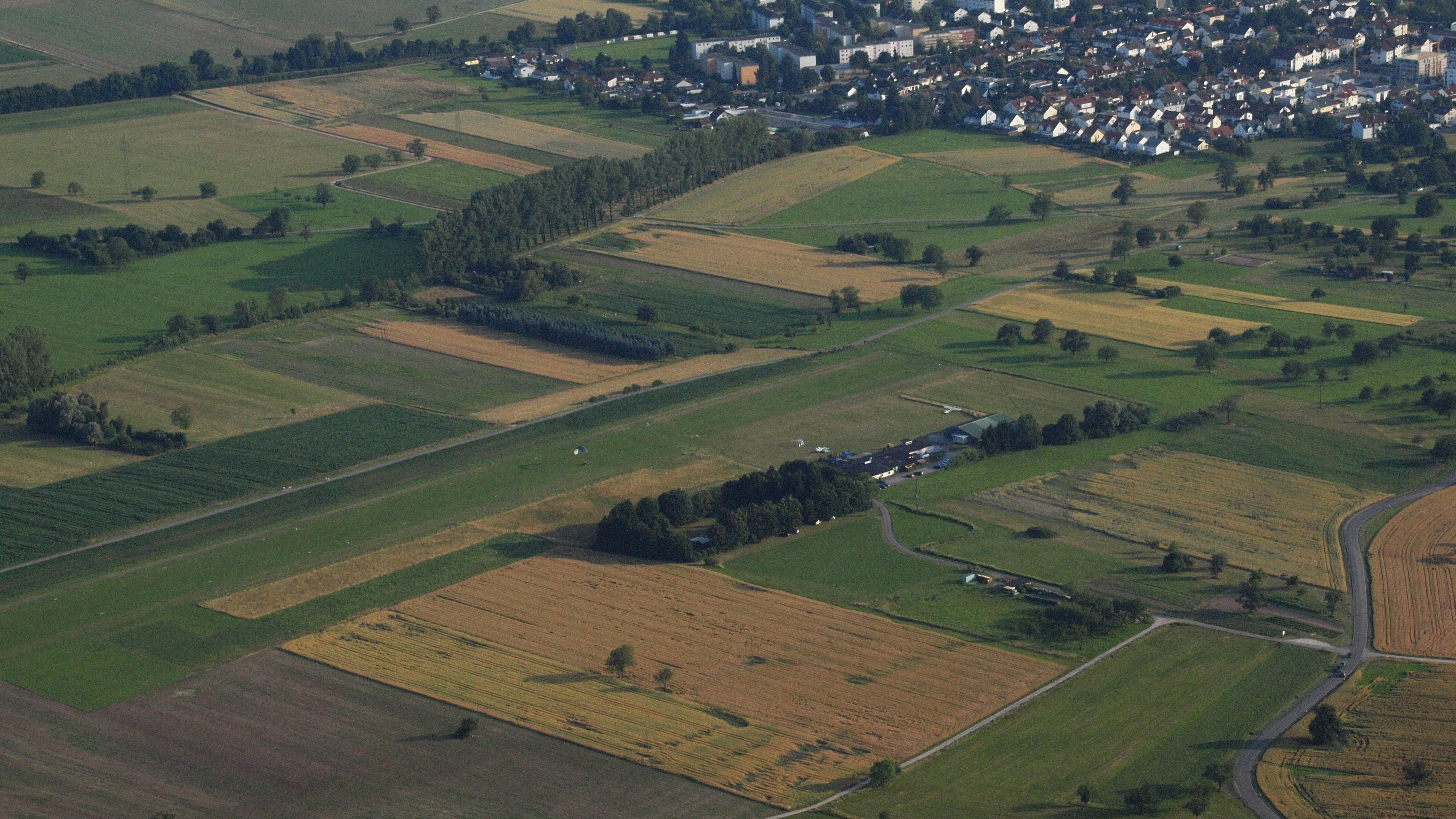 Flugplatz Rheinfelden, Rheinfelden (Baden): Luftaufnahme